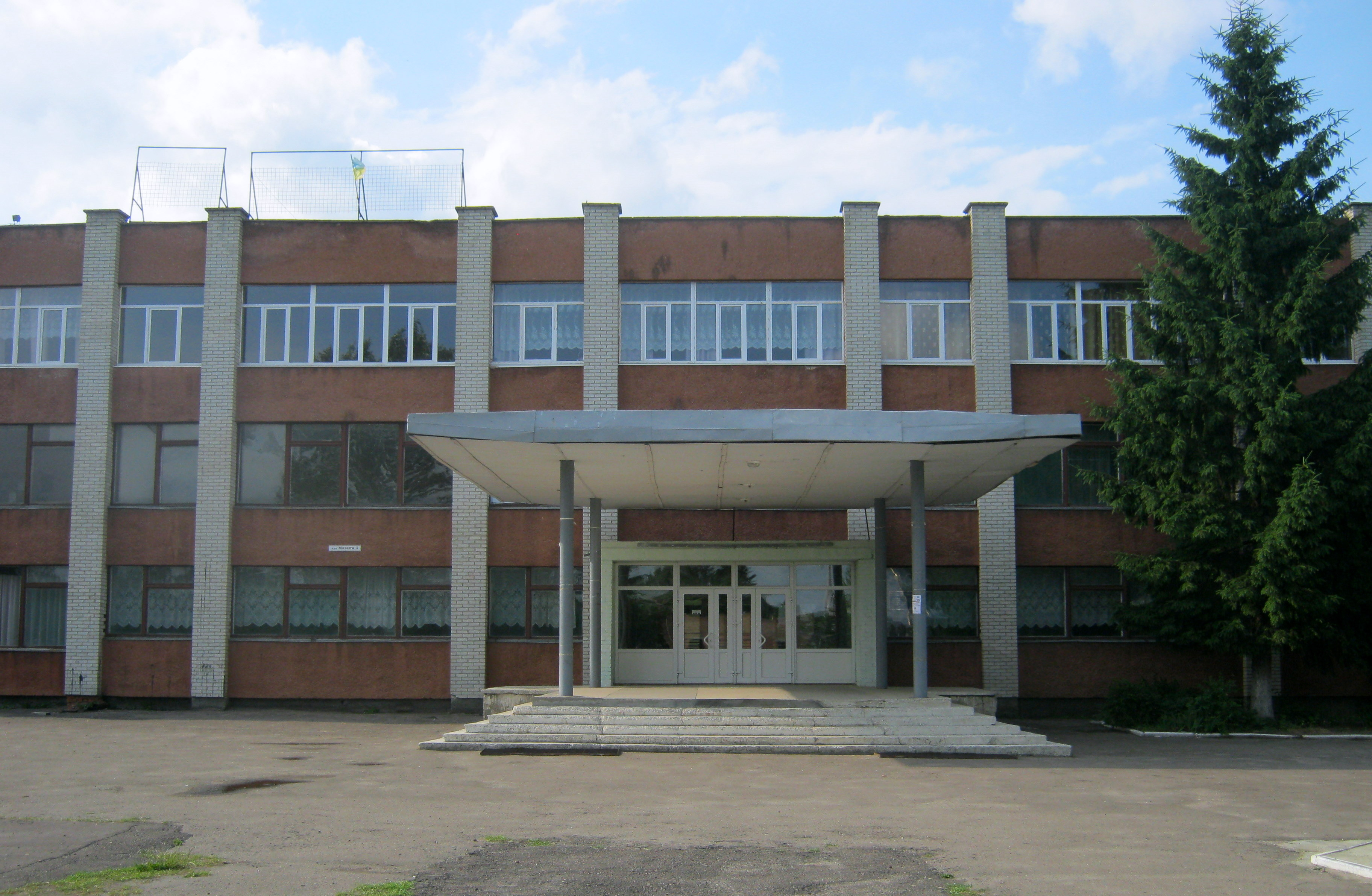 ЗОШ №1 с. Зимна Вода, Пустомитівський район, Львівська область